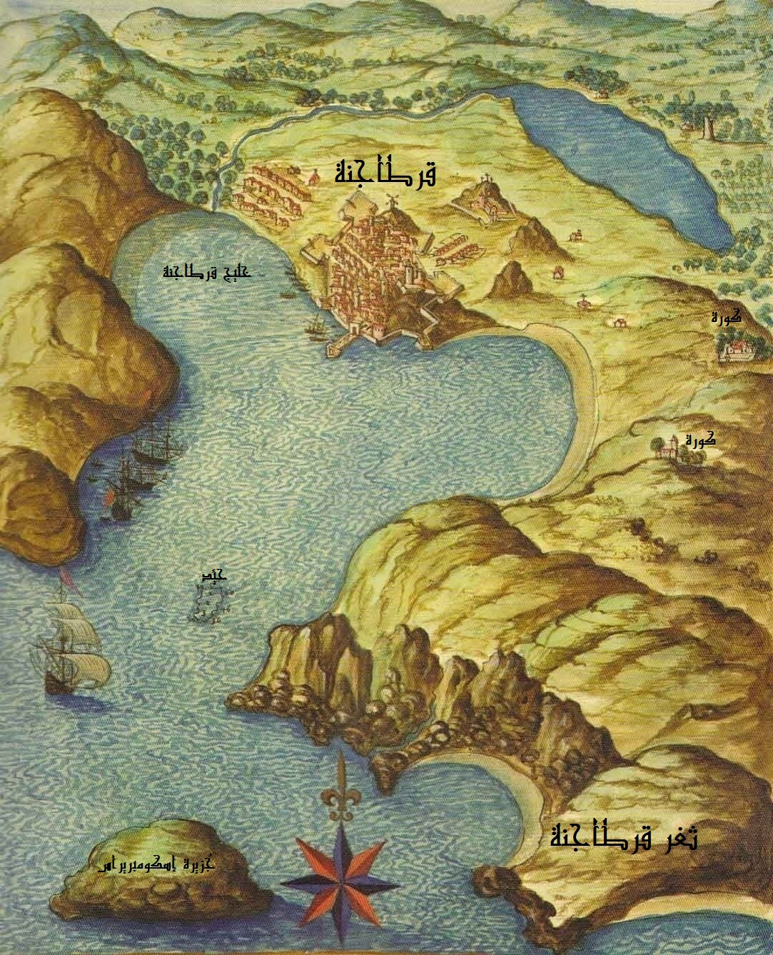 مُخطط مدينة قرطاجنة في إسپانيا سنة 1634م، من تصميم عالم الخرائط بدروس تيِخييرا ألبيرناث.